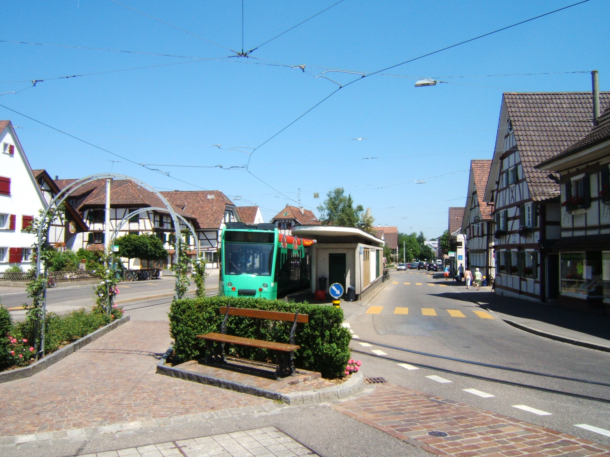 Tramhalte gezien vanuit de keerlus